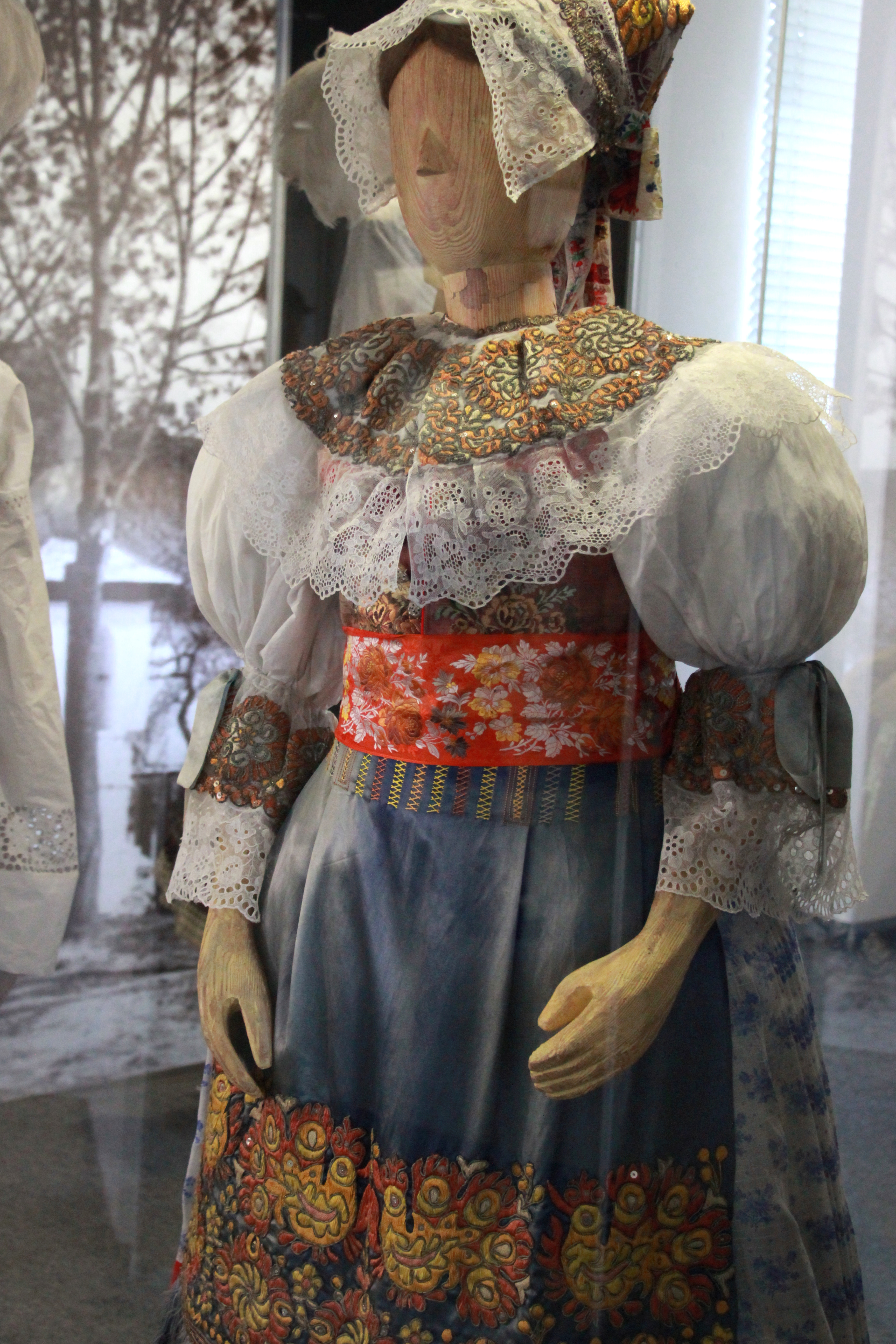 Świąteczny strój kobiecy z około 1925 roku, z miejscowości Starý Tekov, powiat Levica na Słowacji. Muzeum Narodowe w Martin na Słowacji.